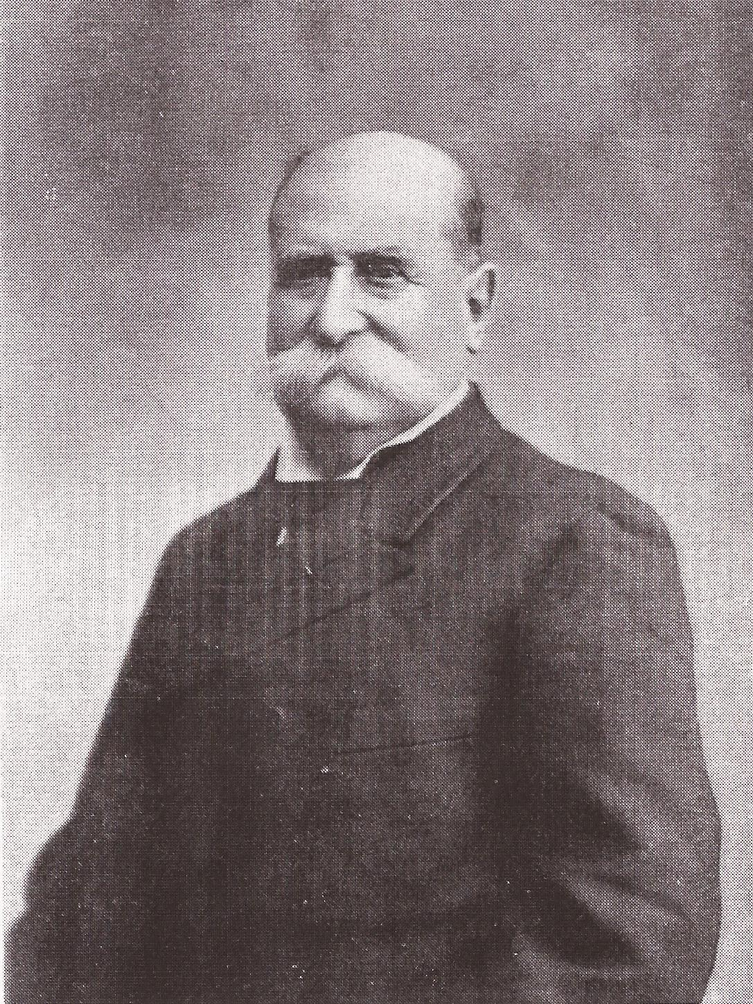 Retrato de Manuel Obarrio